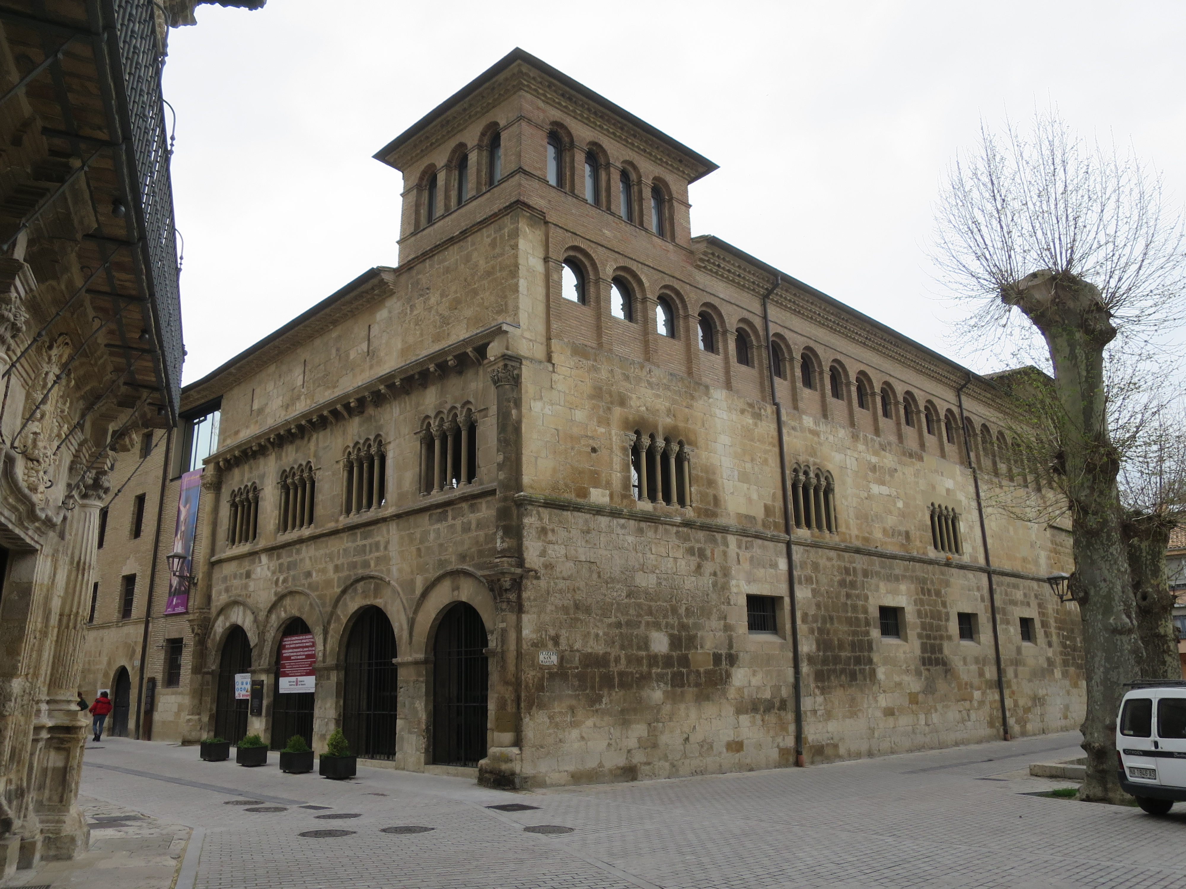 Ostfassade des Palacio de los Reyes de Navarra, Estella